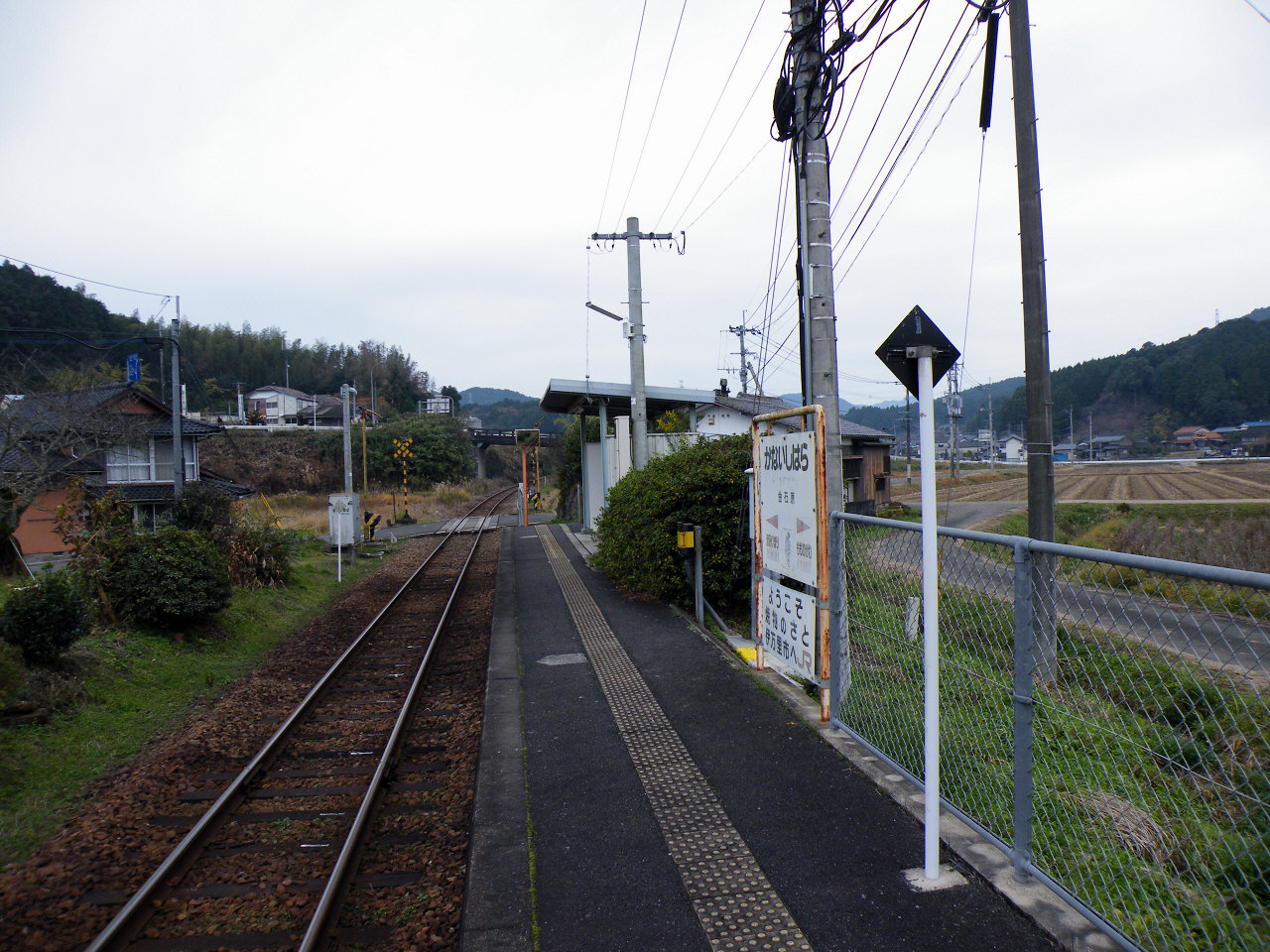 JR九州筑肥線金石原駅